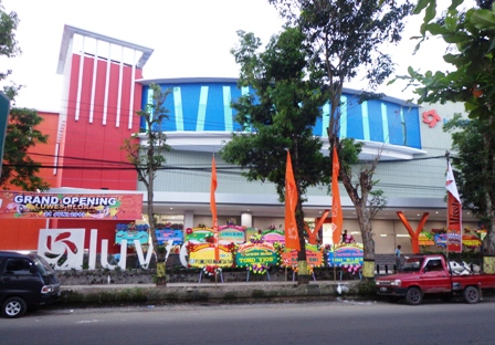 Luwes Blora Pusat Perbelanjaan Modern terbesar di Blora